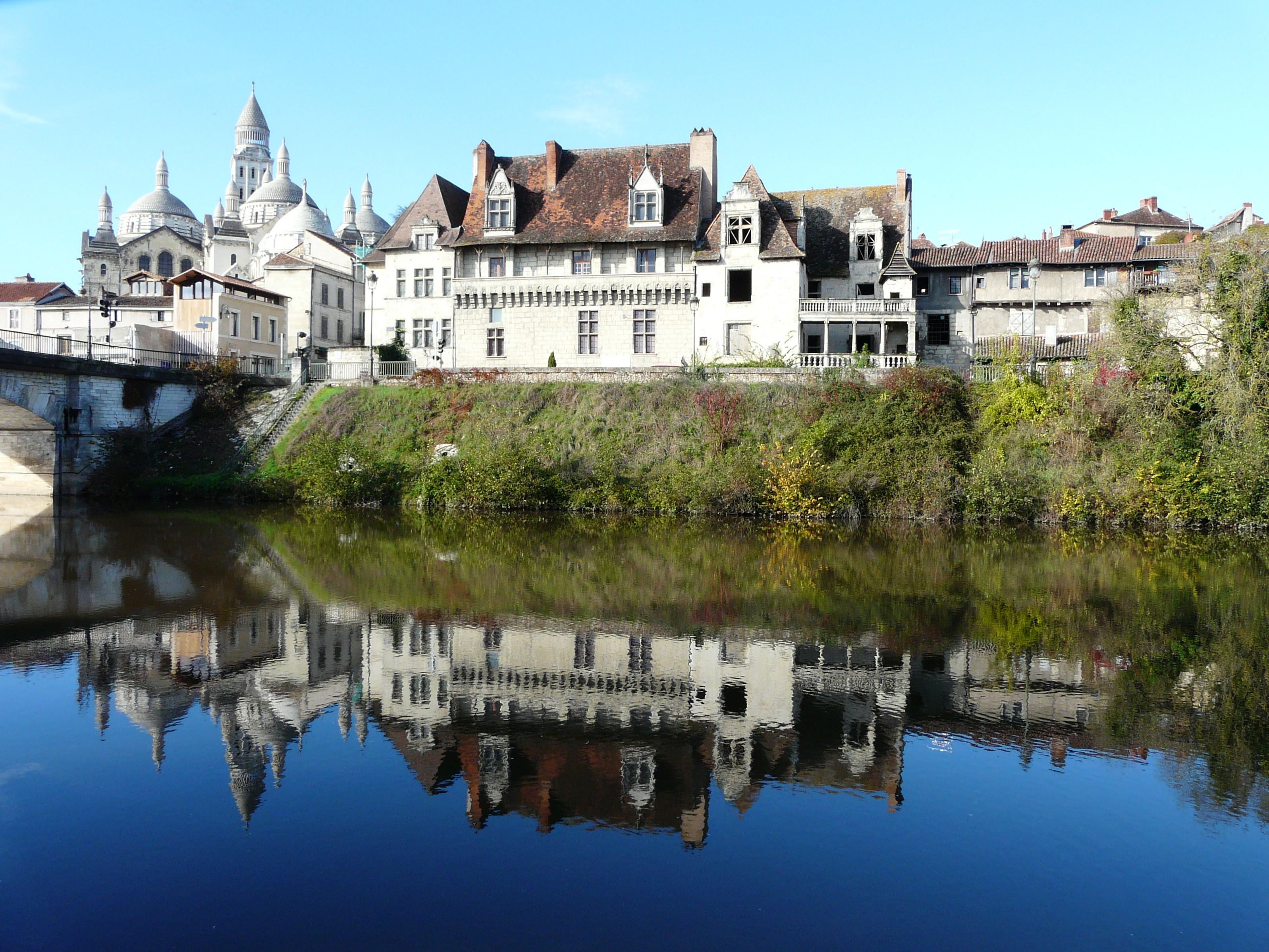 L'Isle, la cathédrale Saint-Front et les maisons des Quais, Périgueux, Dordogne, France. Vue prise en direction de l'aval.